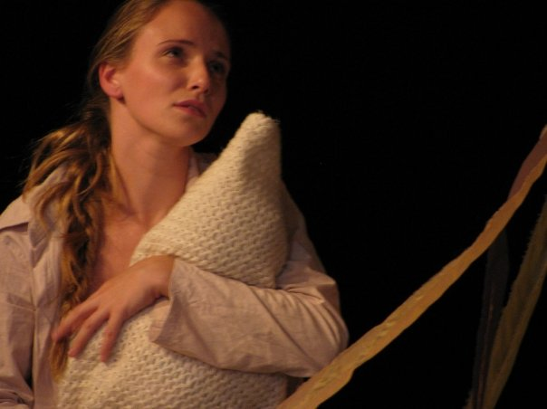 קארין סרויה באשכבה